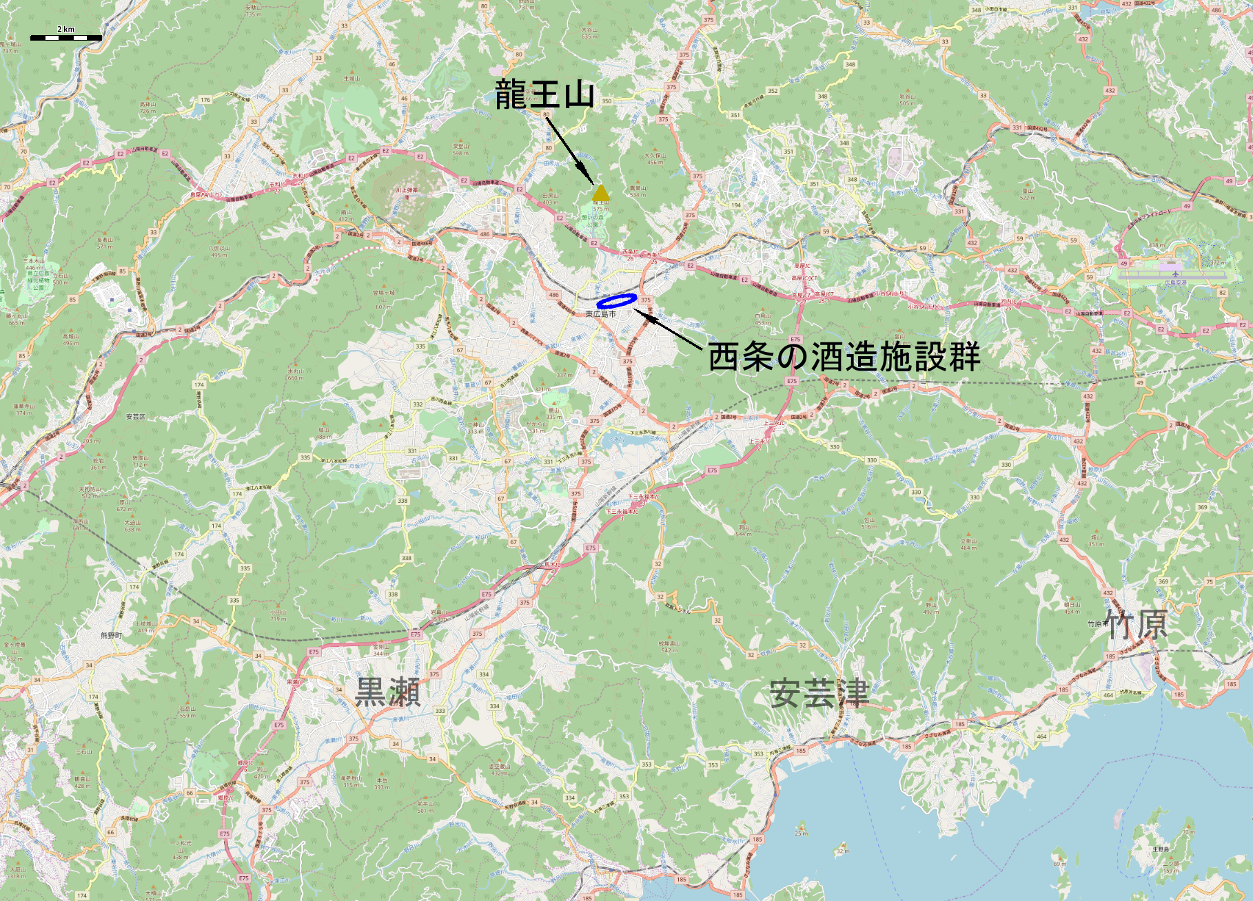 西条の酒造施設群周辺地図 This map may be incomplete, and may contain errors. Don't rely solely on it for navigation.